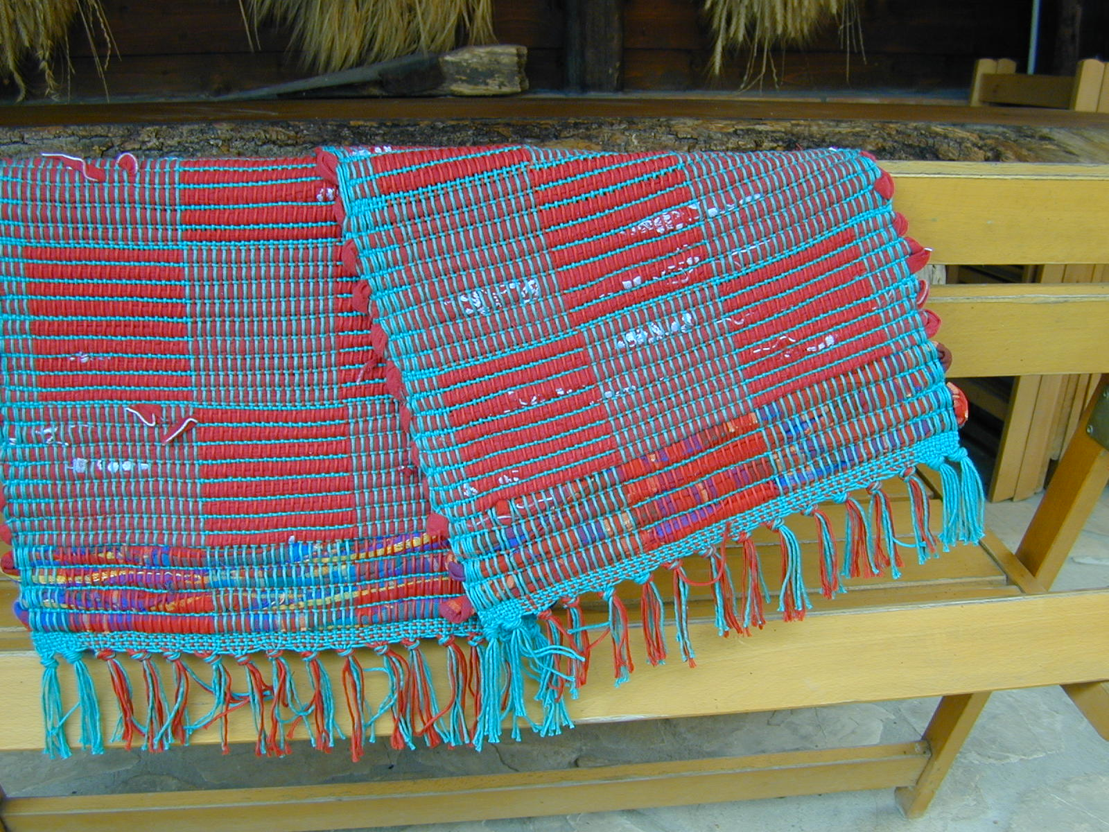 foto mia personale, 2007 Licensing Categoria:Immagini sulla tessitura